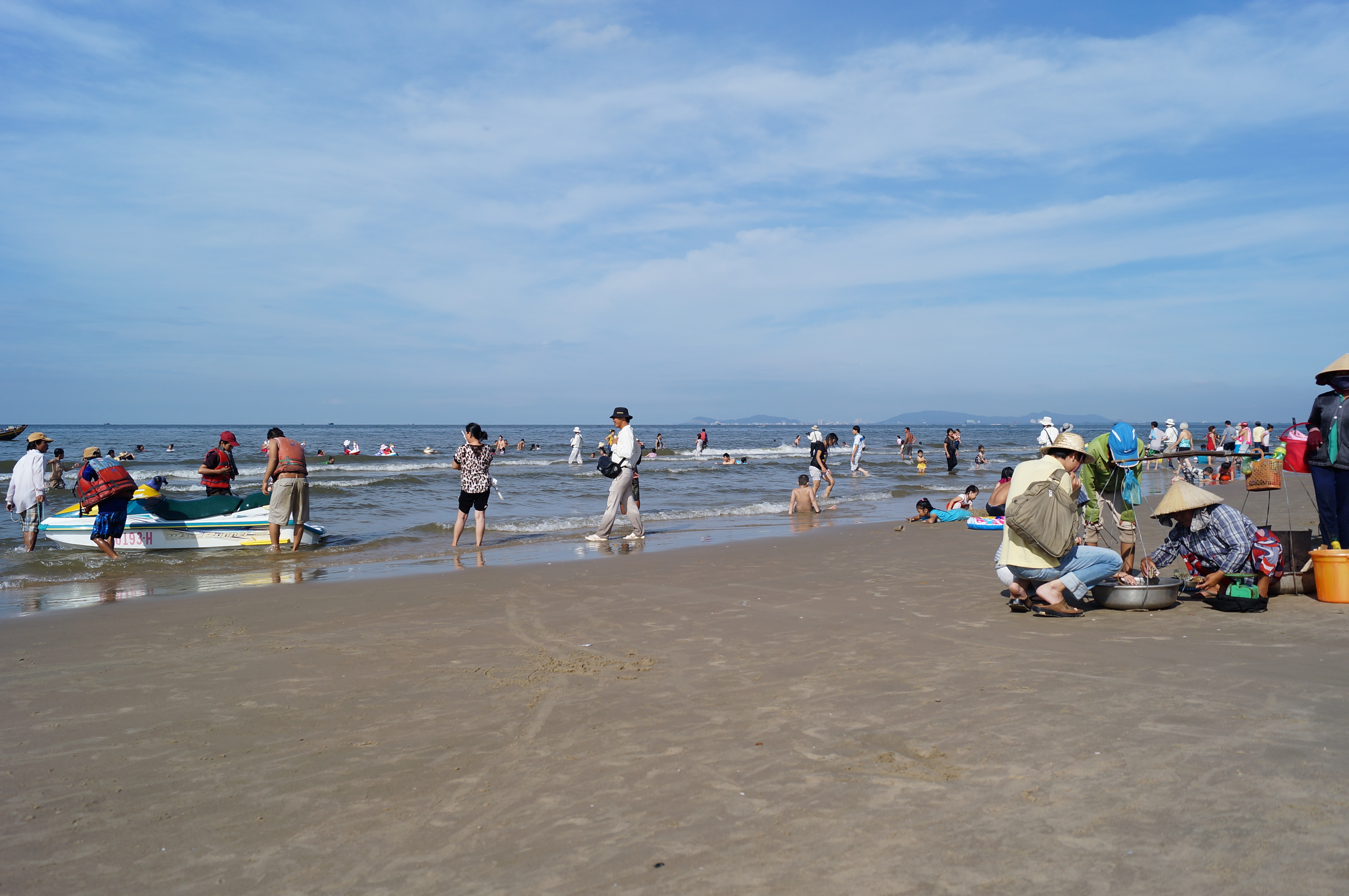 Một góc bãi biển Long Hải, thị trấn Long Hải, huyện Long Điền, tỉnh Bà Rịa - Vũng Tàu.